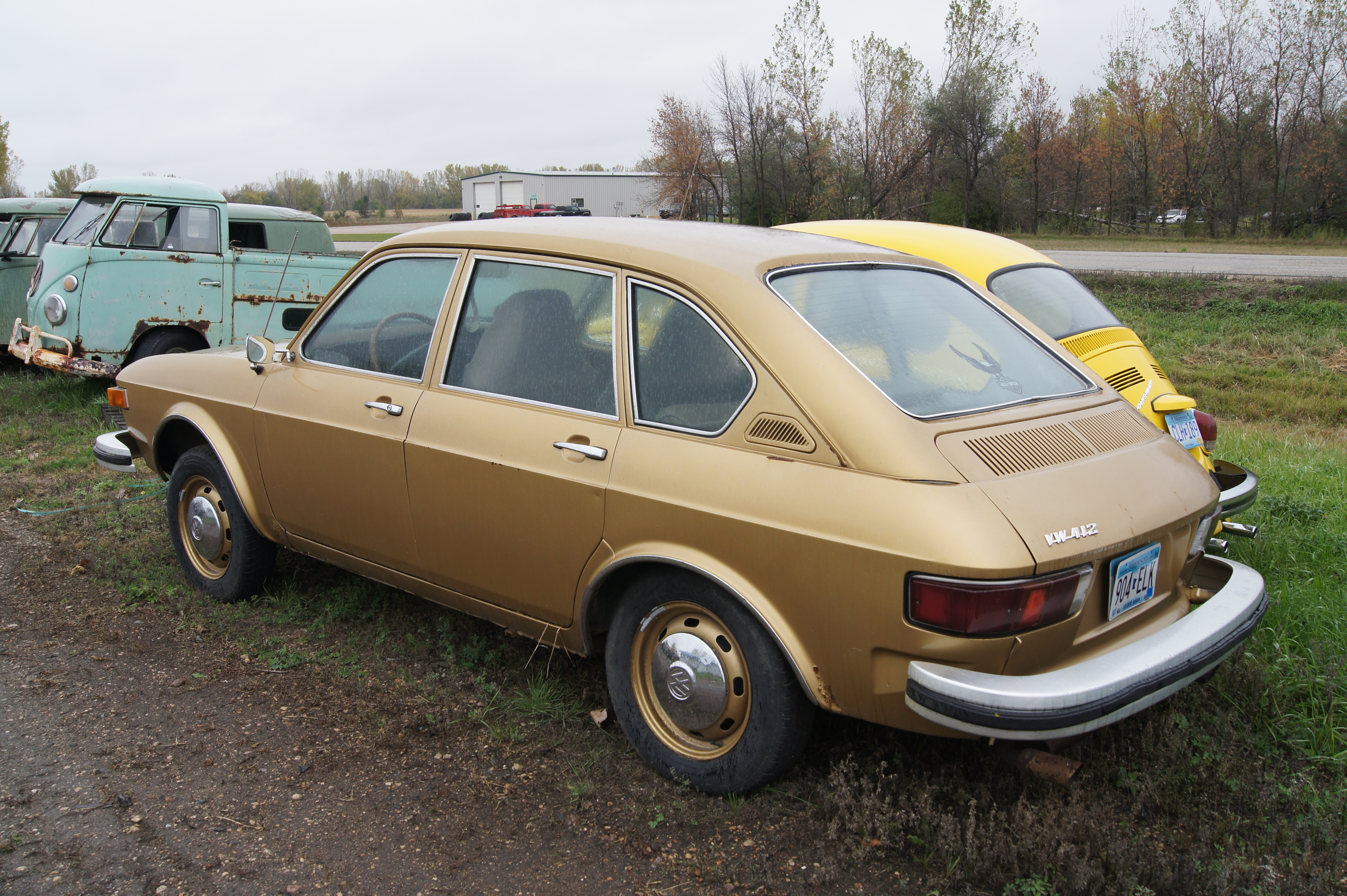 74 Volkswagen 412